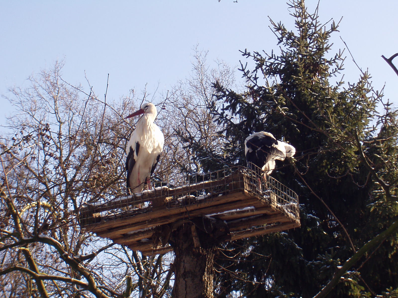 Zwei Störche (Ciconia ciconia) überwintern im Tierpark Fauna, Solingen